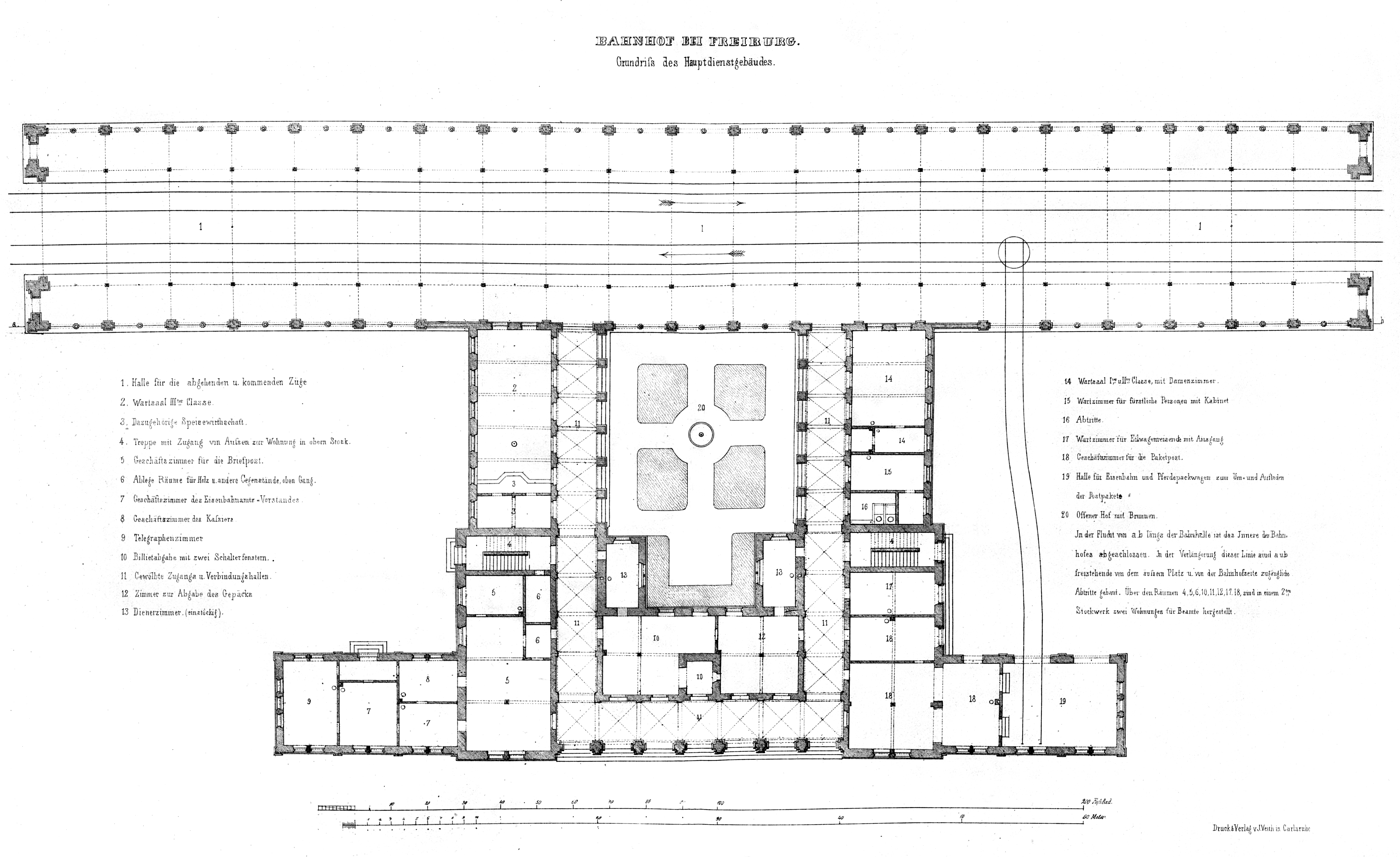 Grundriss des Hauptdienstgebäudes des Freiburger Hauptbahnhofs